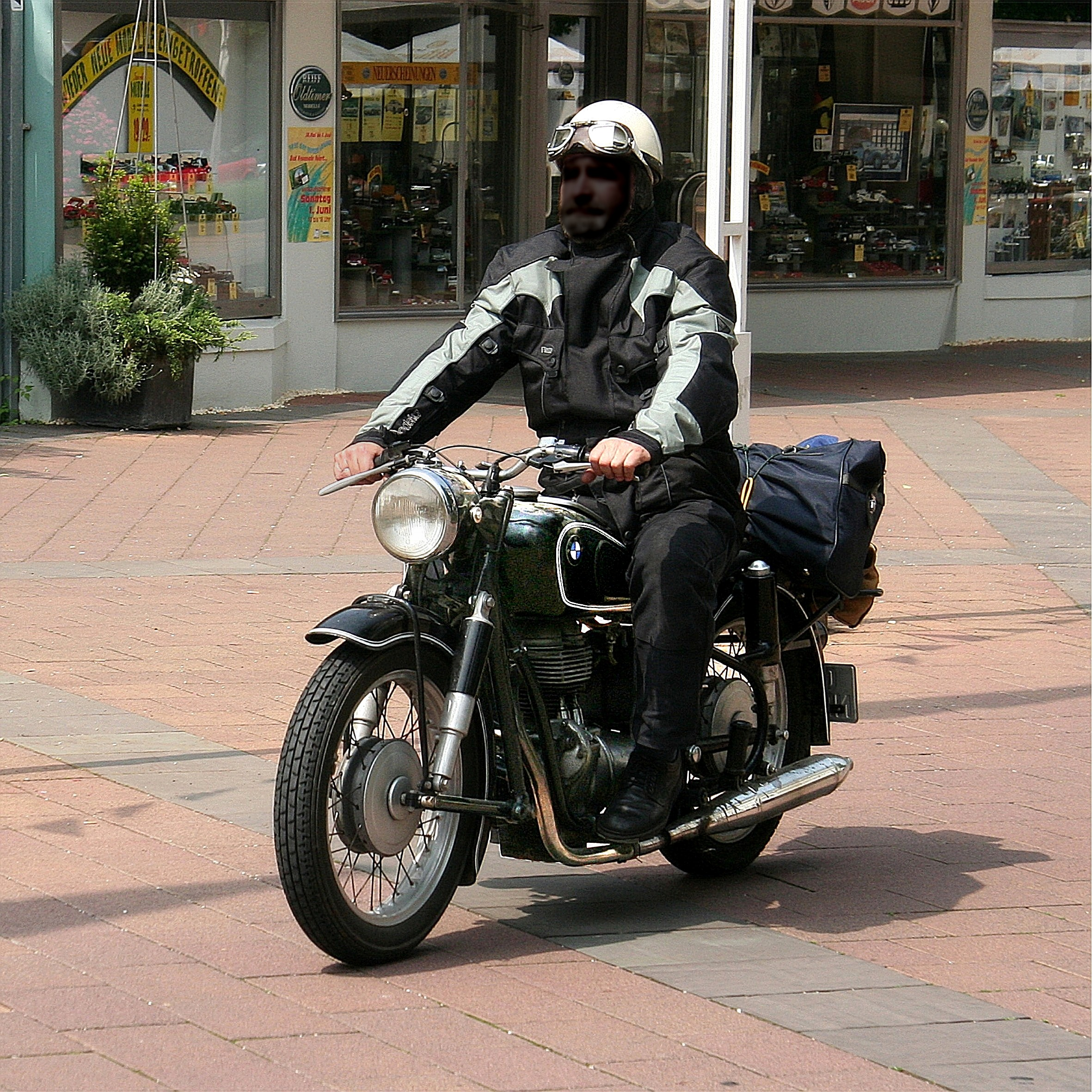 BMW R26 (in Bad Neuenahr)